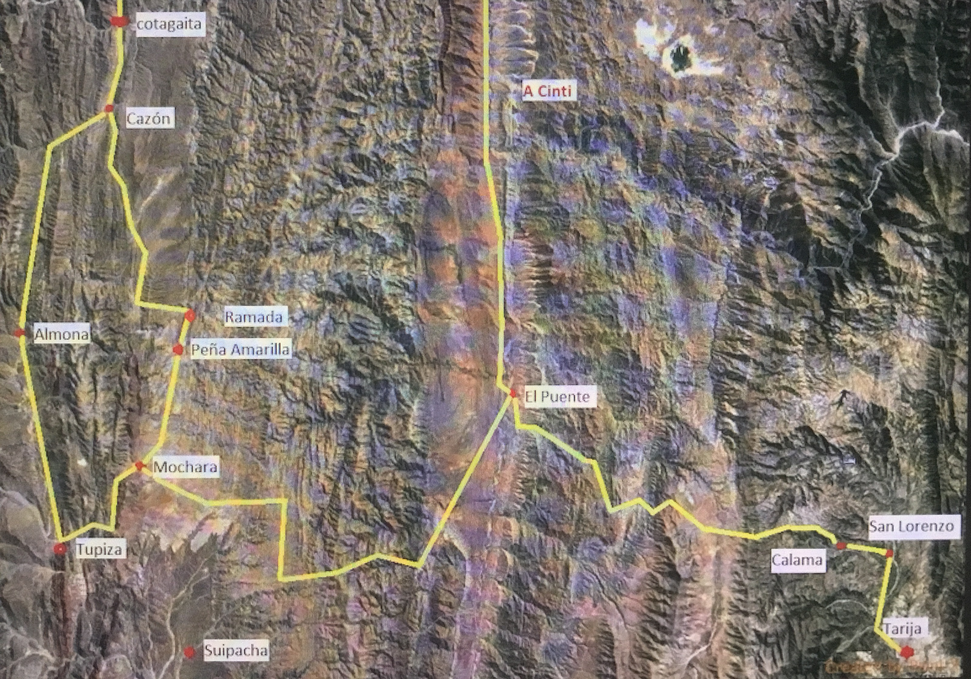 Batalla de Cotagaita (27/oct/1810) Principales localidades del teatro de operaciones.